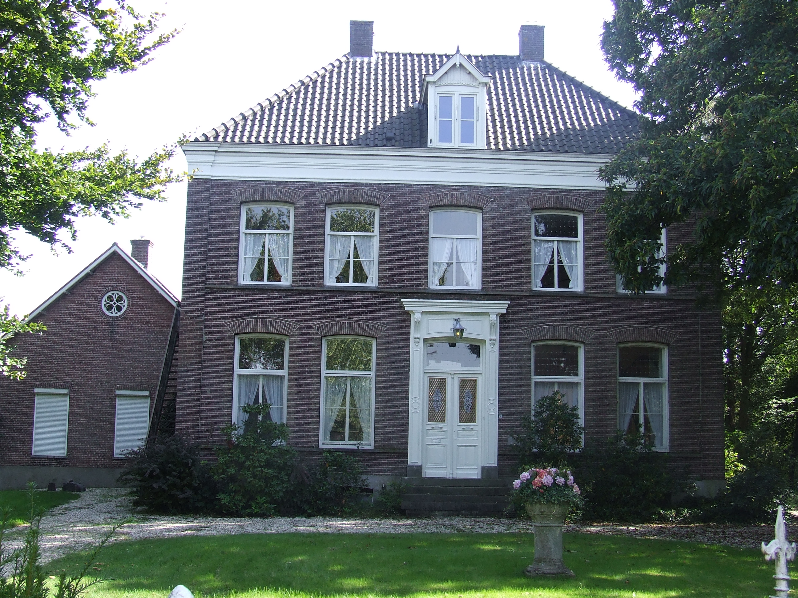 Hoogstraat 51-51a, Berlicum